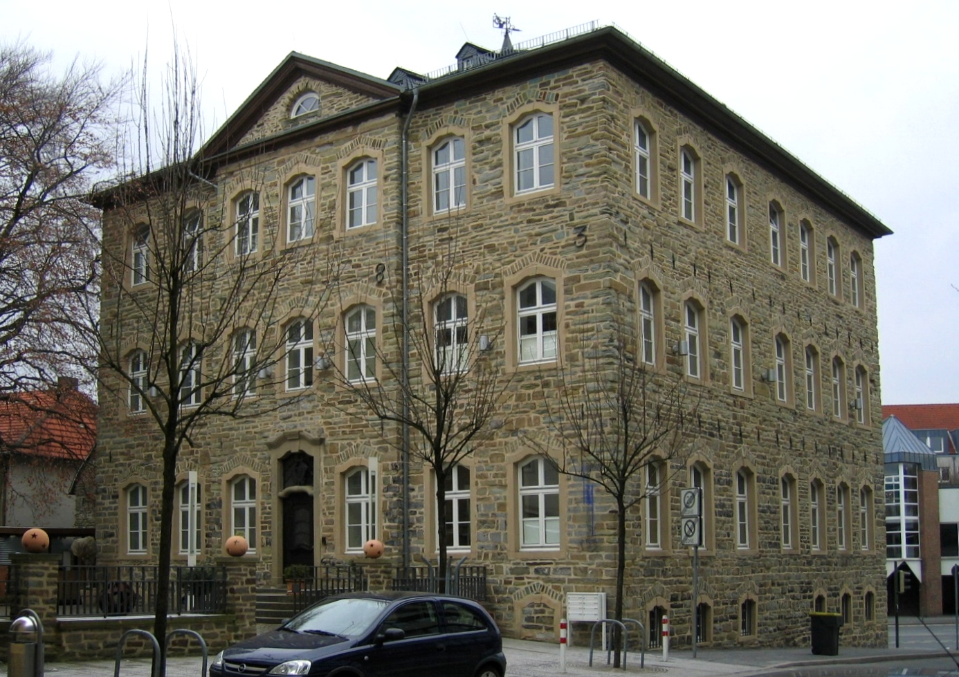 Description: "Scheiblersches Haus" (erbaut 1783), Theodor-Heuss-Ring 24, Iserlohn Source: selbst fotografiert Date: 16. März 2006 Author: Asio otus